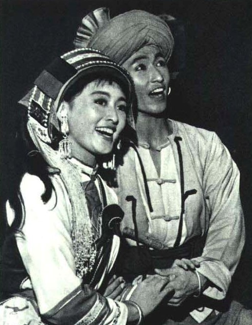 1963-11 1963 电影阿诗玛剧照